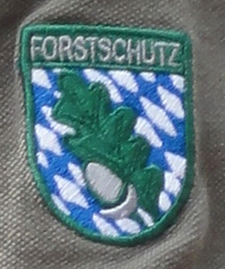 Schönau am Königssee